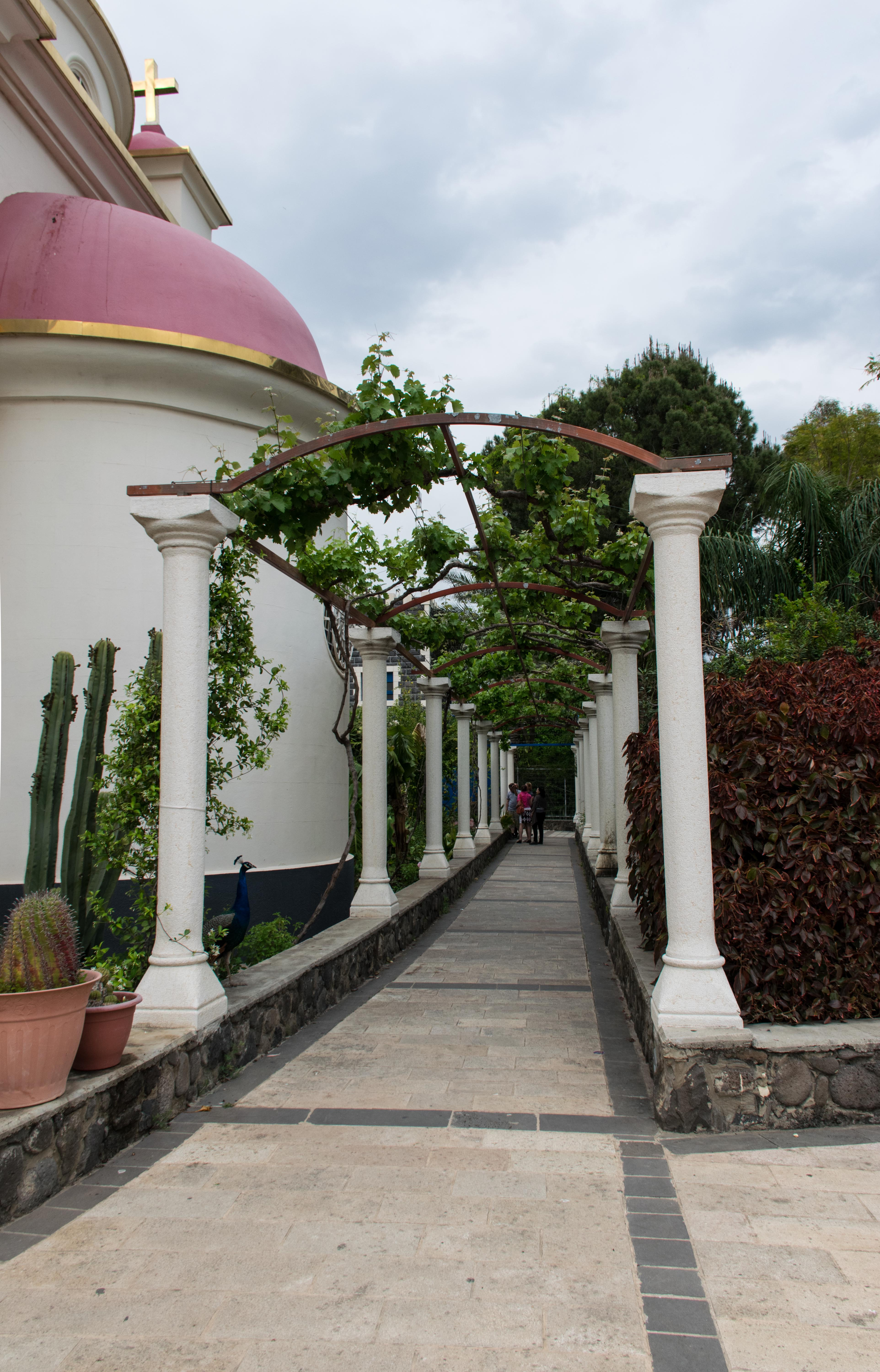 DSC_1692.jpg Tiberias